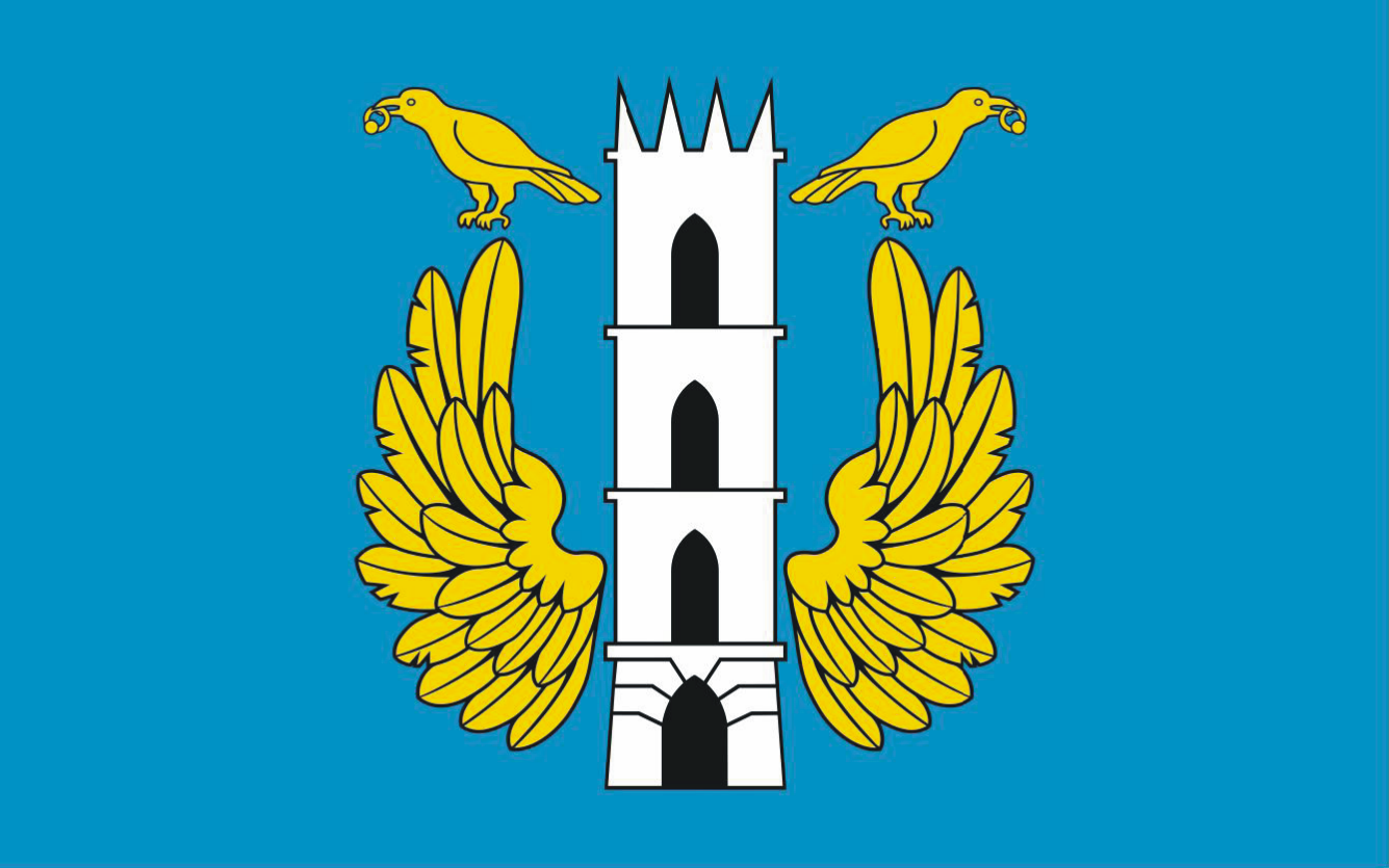 Flaga gminy Opinogóra Górna